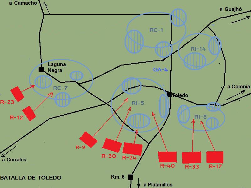 Batalla de Toledo febrero marzo 1933 Guerra del Chaco